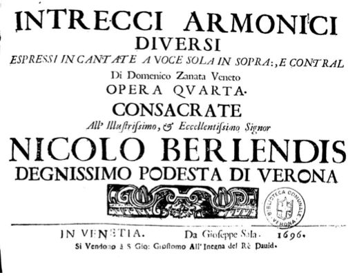 ntrecci armonici / Diversi / Essi In Cantate A Voce Sola In Sopra:, E Contralto / Di Domenico Zanata Veneto. / Opera Quarta. / Consacrate / All’ Illustrissimo, et Eccellentissimo Signor / Nicolo Berlendis / Degnissimo Podesta di Verona / In Venetia. Da Giuseppe Sala. 1696. / Si Vendono à S. Gio: Grostomo All’Inegna del Rè David. Biblioteca Civica di Verona, segn: 136.19